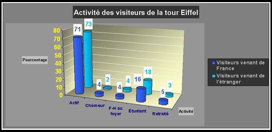 Activité des visiteurs de la tour Eiffel; d'après une enquête de l’institut de sondage TNS Sofres, réalisé en 1995. Fichier réalisé par moi-même (Utilisateur:Kuxu) sous Excel, puis importé sous paint.